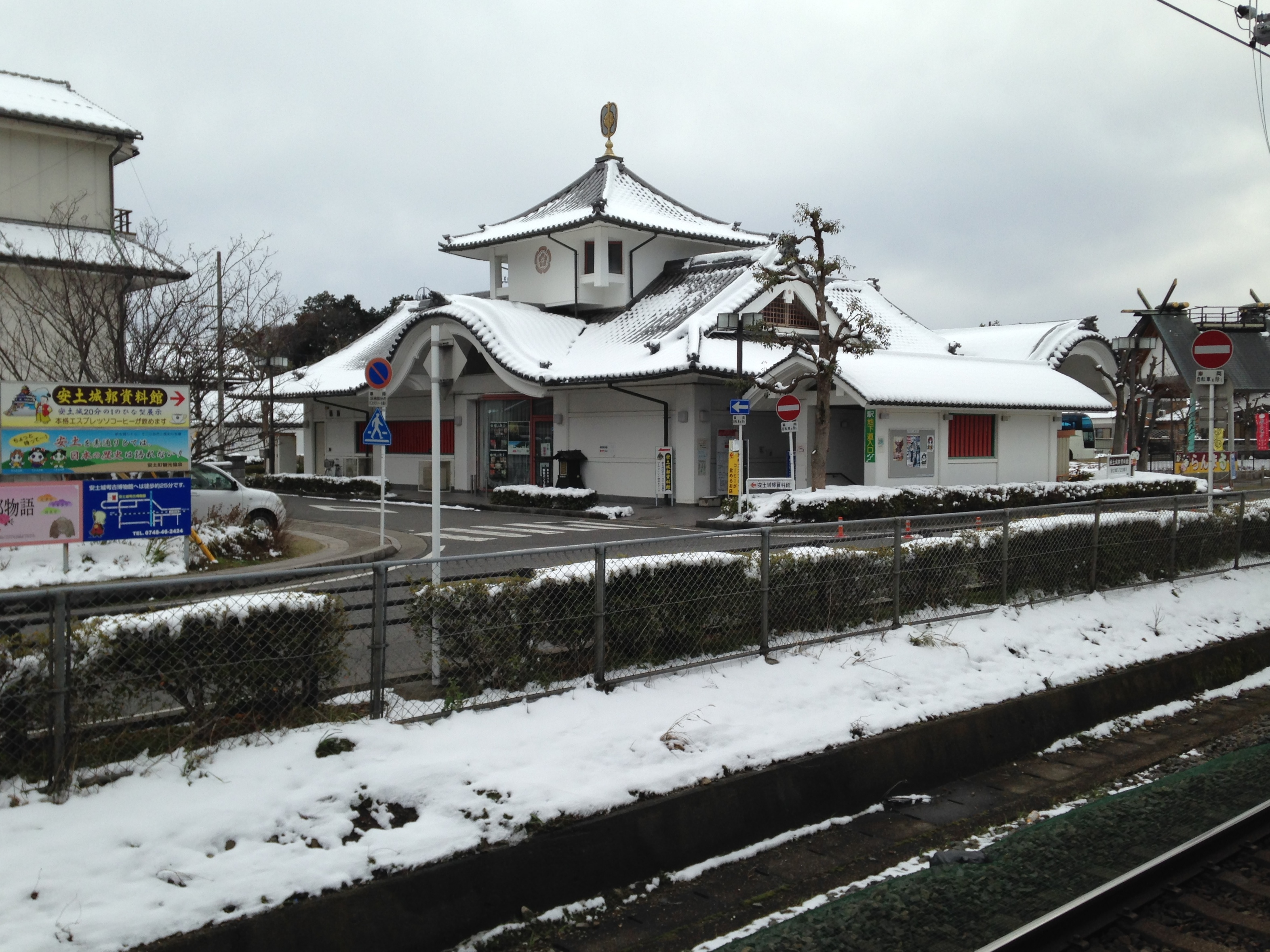 安土駅ホームより望む安土町城郭資料館